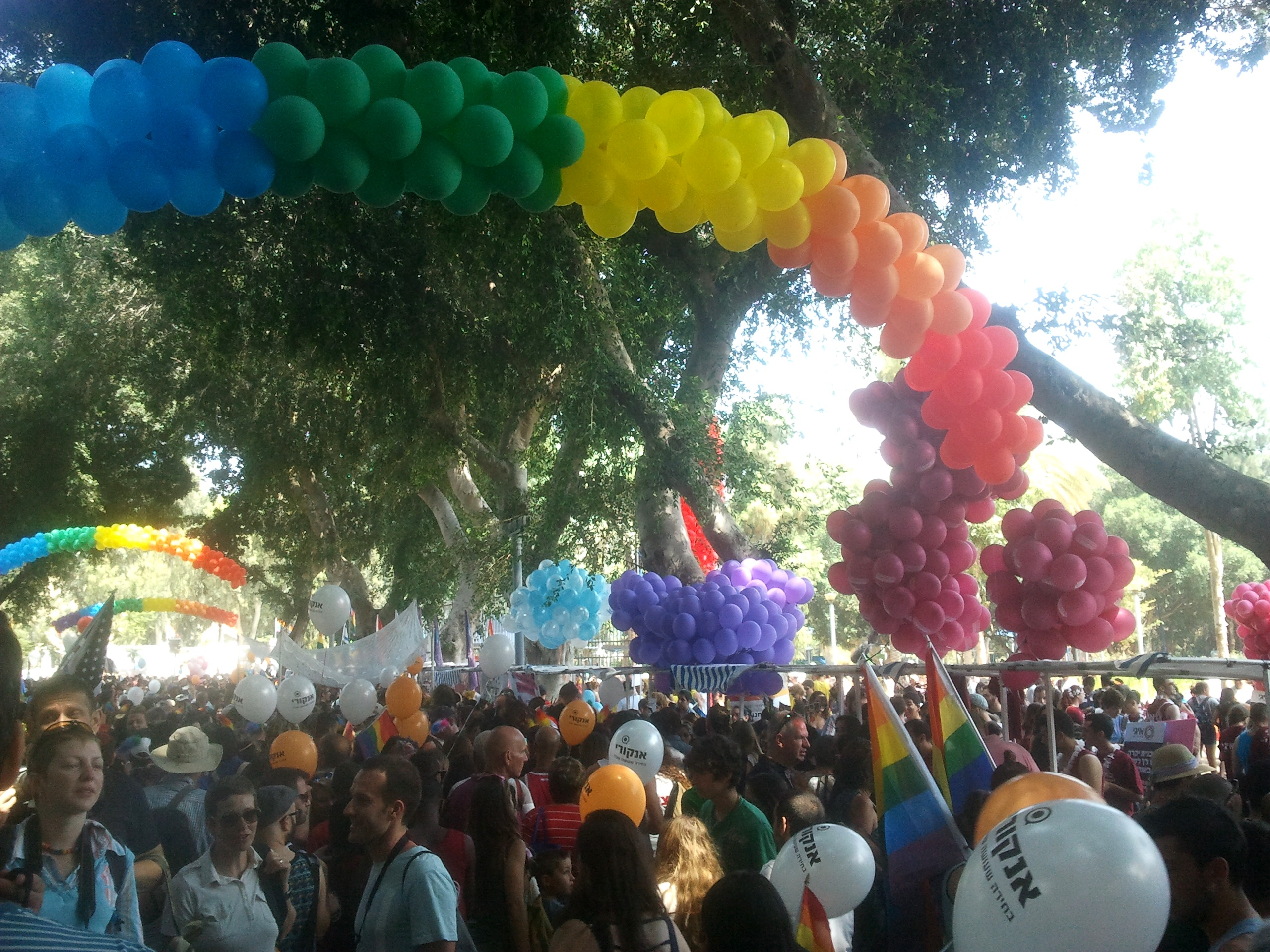 חגיגות מצעד הגאווה בתל אביב. תחילת החגיגות בגן מאיר, כללו דוכנים של גופים שונים, קהל רב חלקו מאופר ומחופש בלבוש ססגוני ומופעי דראג קווין